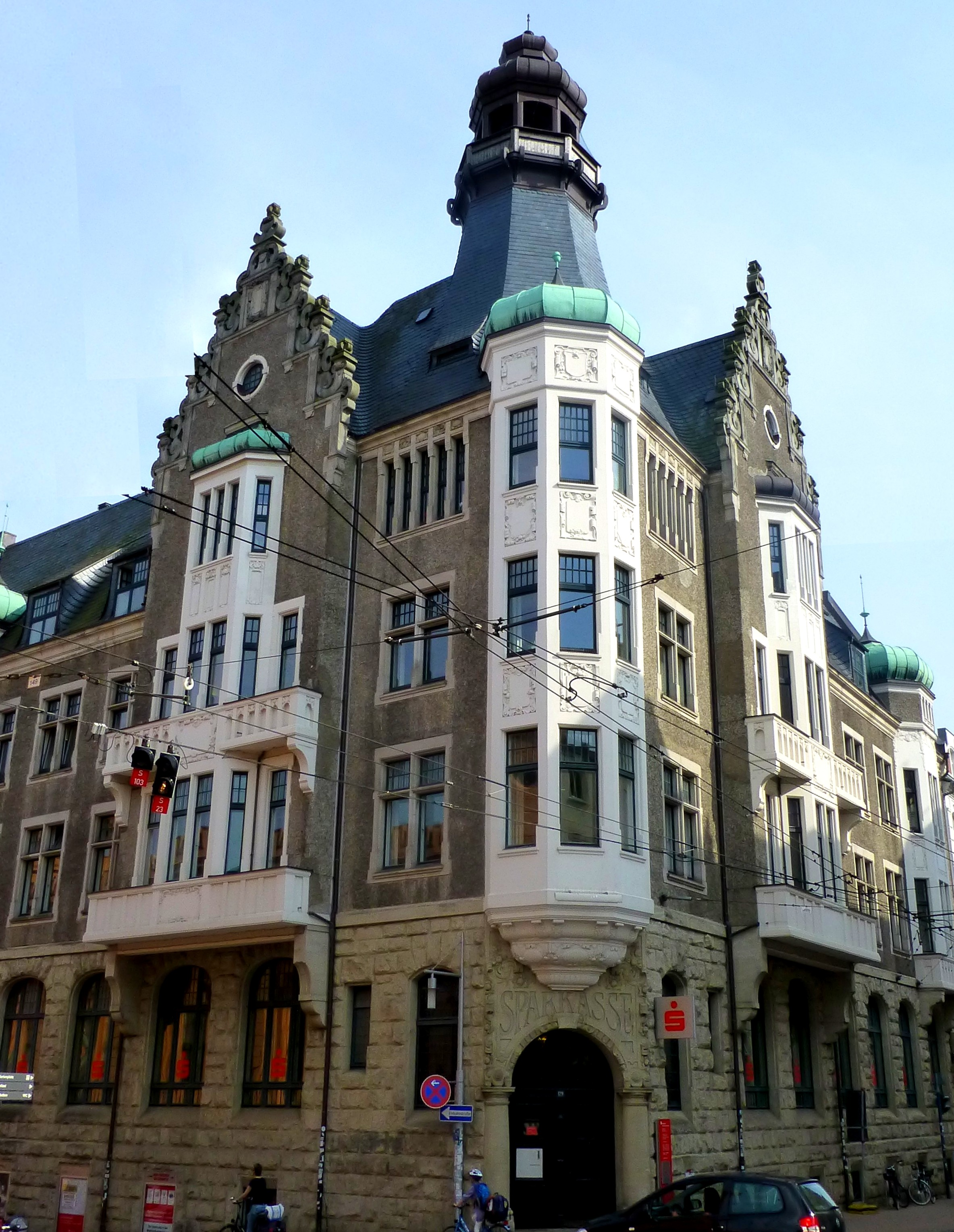 Sparkasse. Denkmalgeschütztes Gebäude Wismarsche Straße 127/129, Ecke Arsenalstraße in Schwerin, Mecklenburg-Vorpommern.